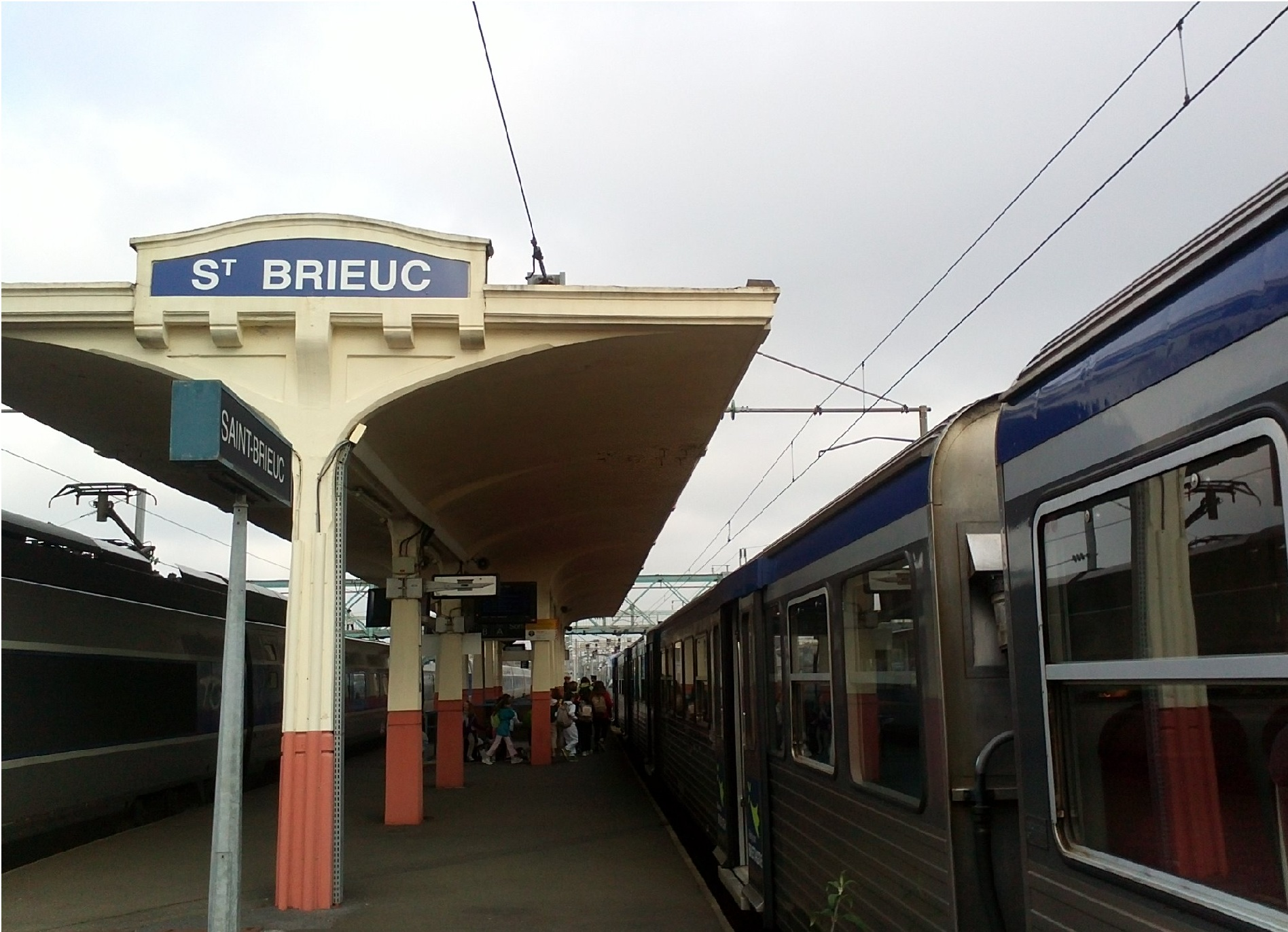 Gare de Saint-Brieuc-2013